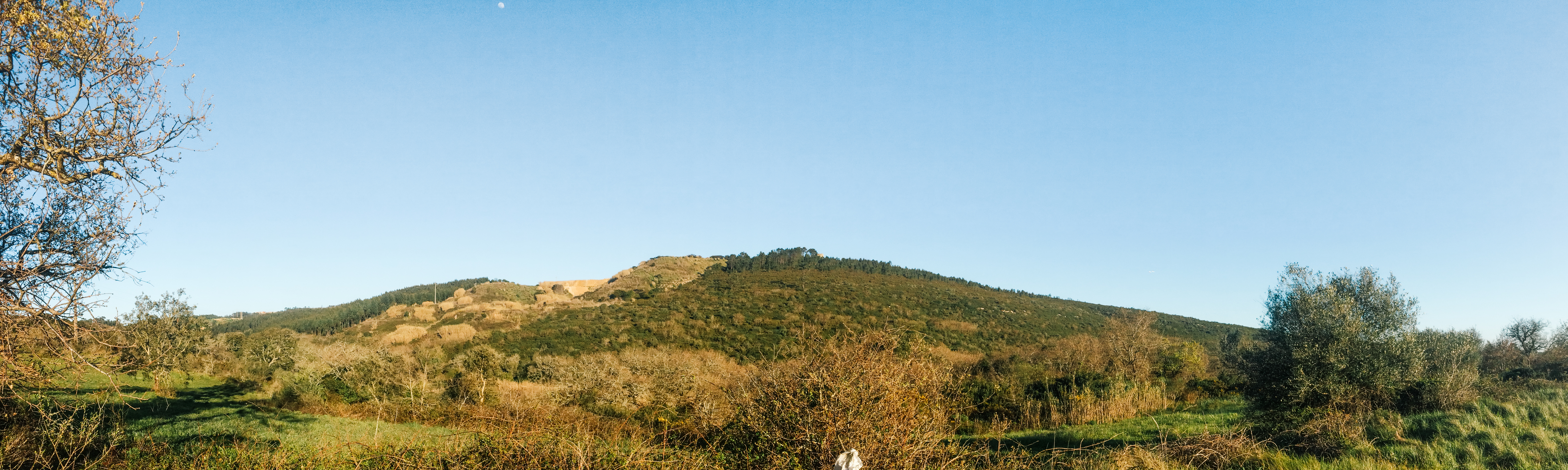 Vista da serra olhando para a zona do Moinho Novo da Mata a partir do Telhal.